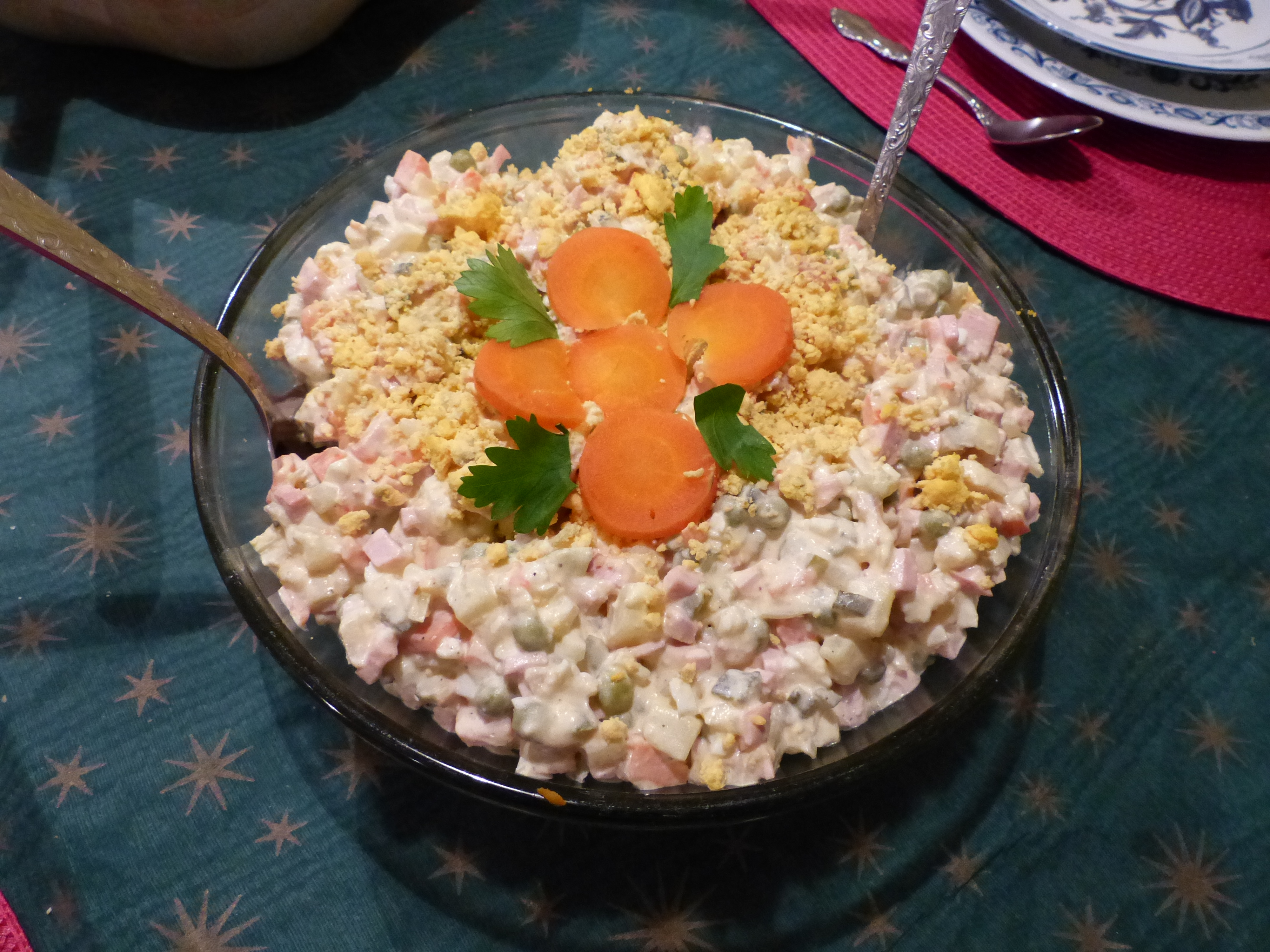 Russischer Oliviersalat (Nina in Dresden)